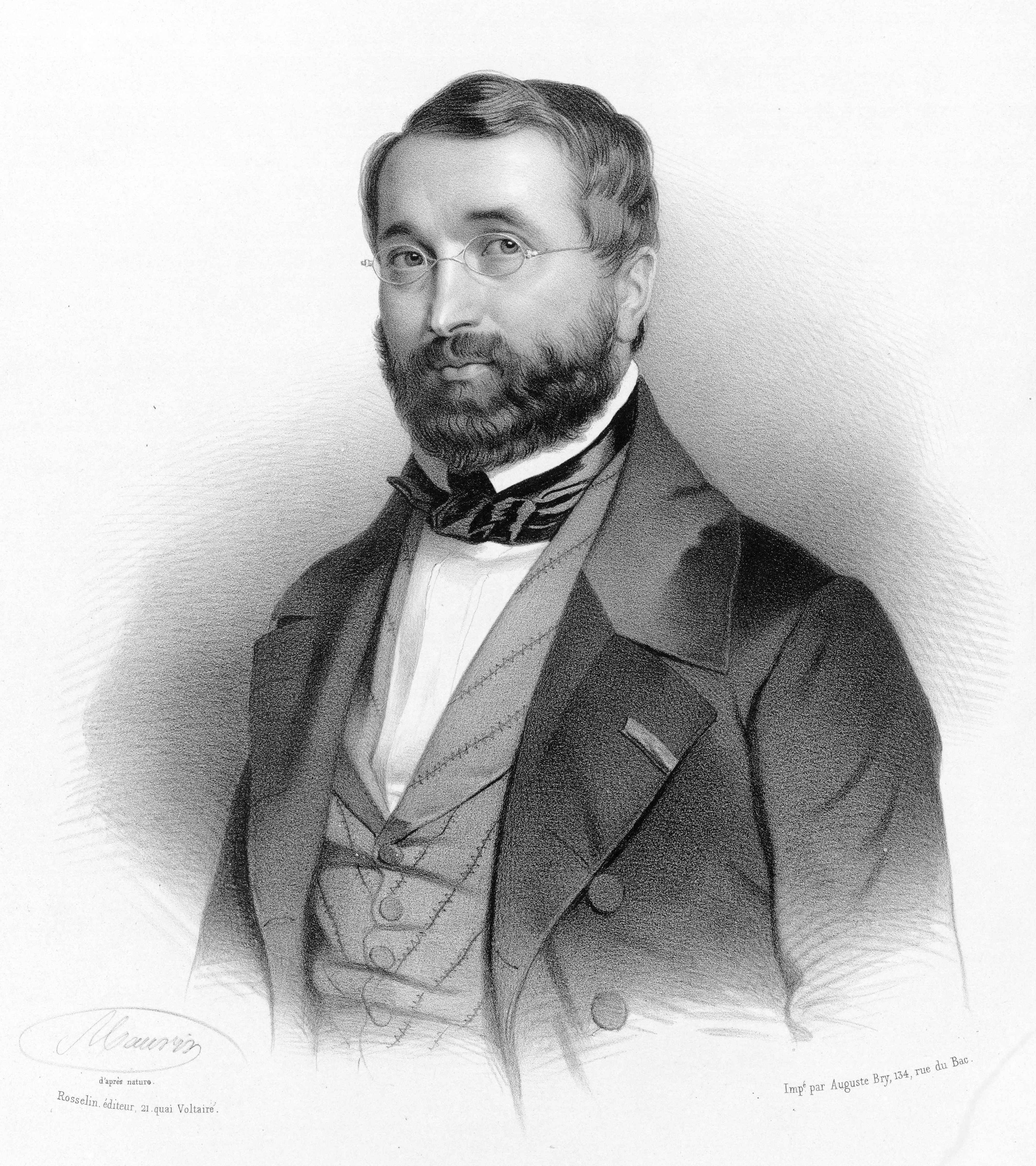 Le compositeur français Adolphe Adam (lithographie de Nicolas-Eustache Maurin, en 1840).